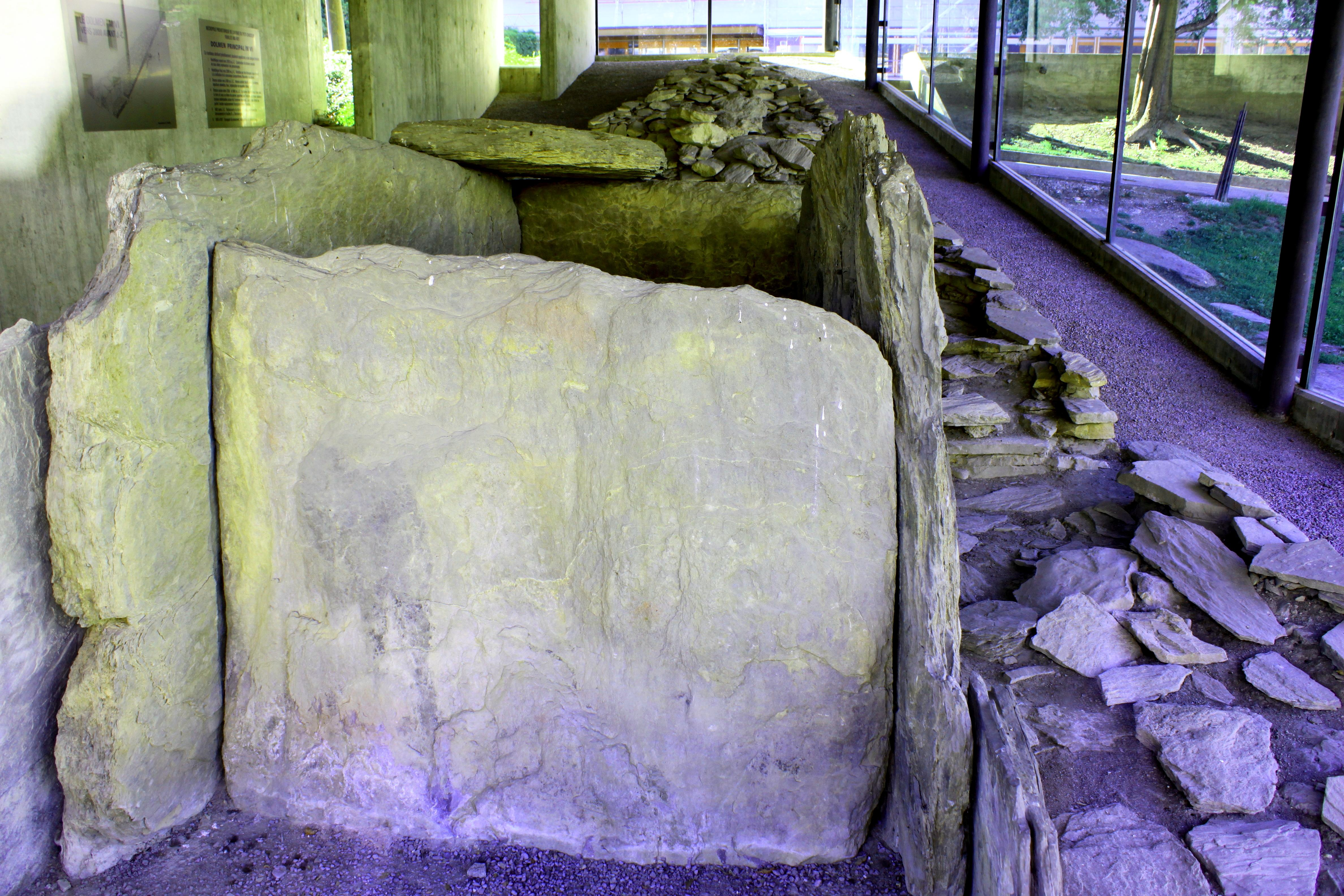 Suisse, canton du Valais, la ville : la nécropole du Petit-Chasseur et celle de Sous-le-Scex témoignent de l'occupation de la ville dès le néolithique.